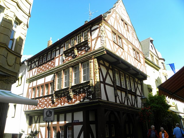 Oberstraße 90 in Boppard: Bodenbach'sches Haus